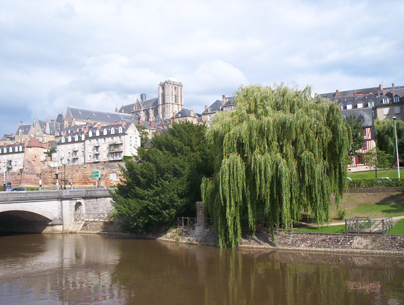 Vue partielle de la muraille de la Sarthe